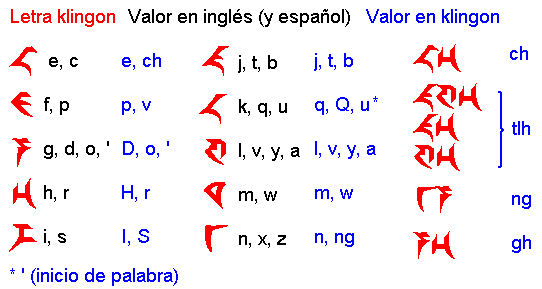 Alfabeto klingon tal como se ve en las cartas de Fleer/Skybox, y en las series de Star Trek.